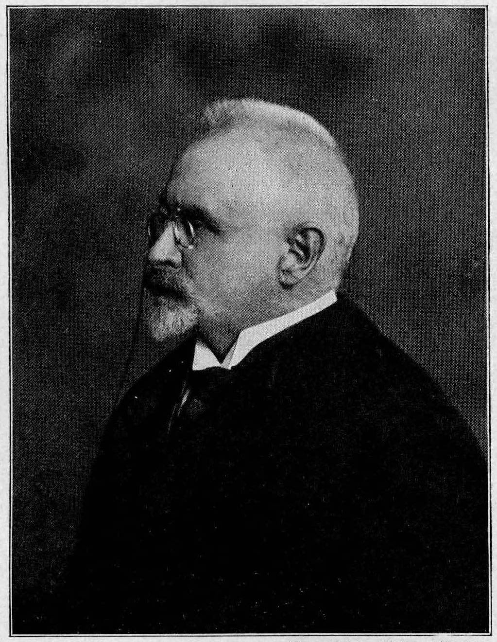 Portrait des Musikwissenschaftler Adolf Sandberger